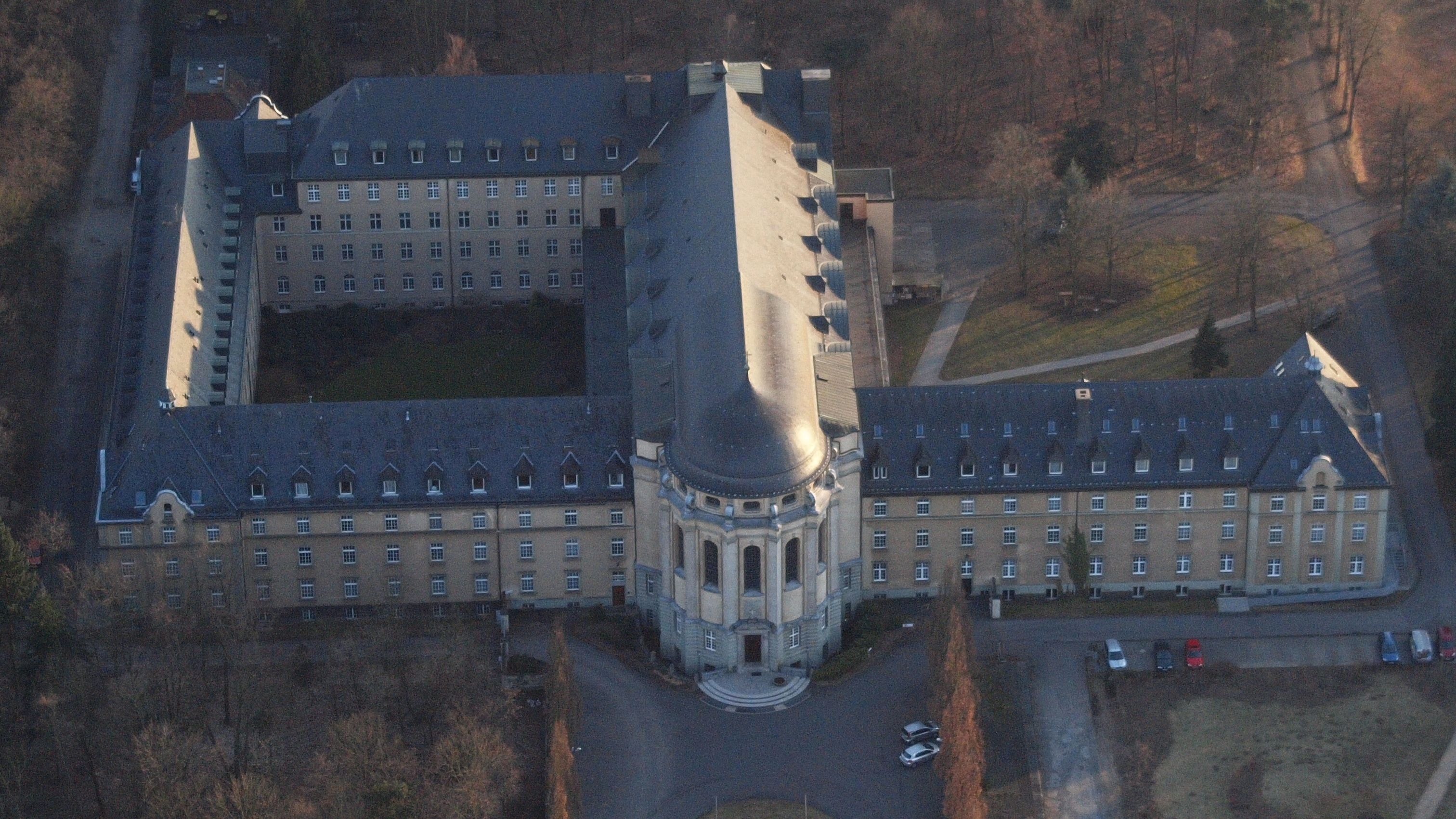 St. Augustin, Missionshaus (inkl. Philosophisch-Theologische Hochschule SVD)